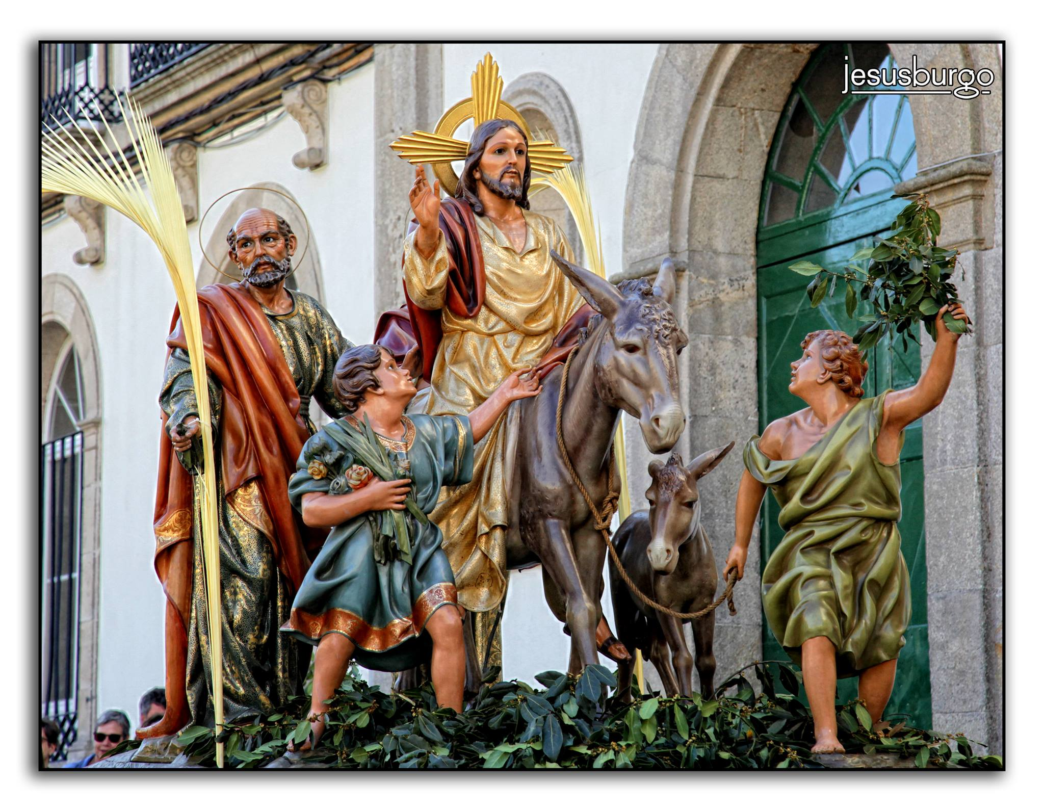 Entrada de Jesús en Jerusalén